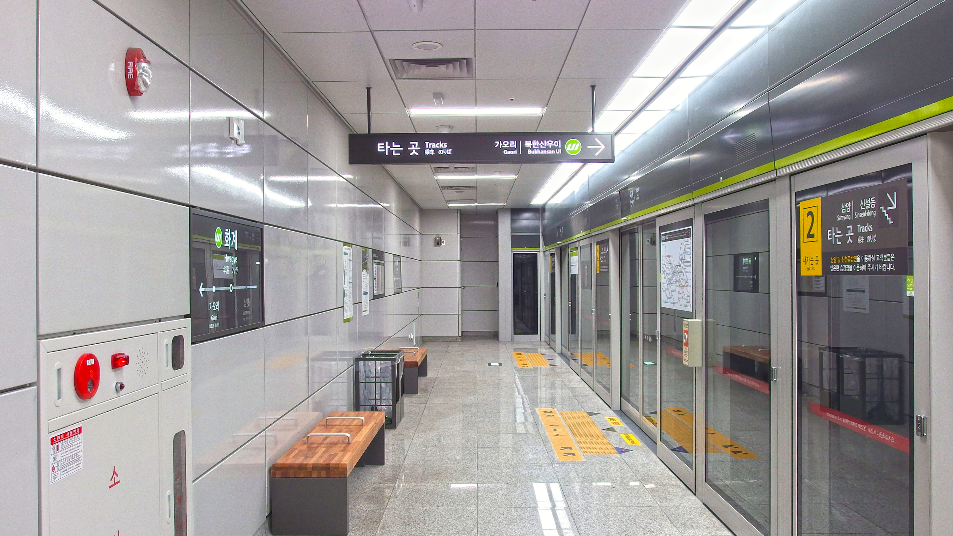 화계역 승강장(상행)